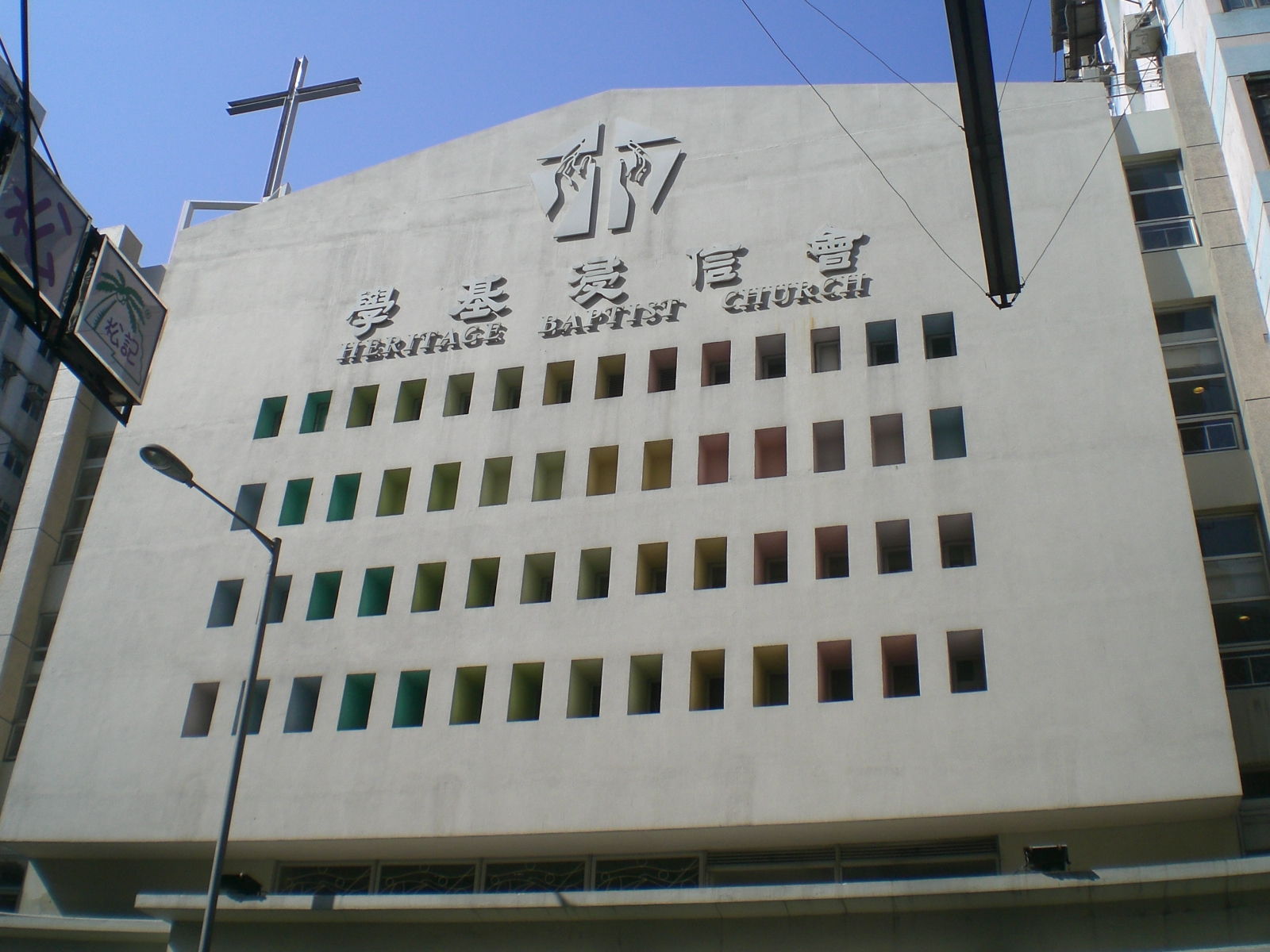 深水埗營盤街學基浸信會前身為樂聲戲院